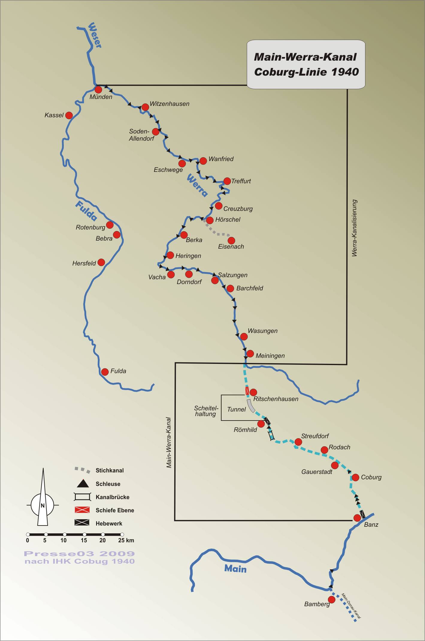 Die Coburg-Linie aus dem Jahr 1940 des geplanten Main-Werra-Kanals